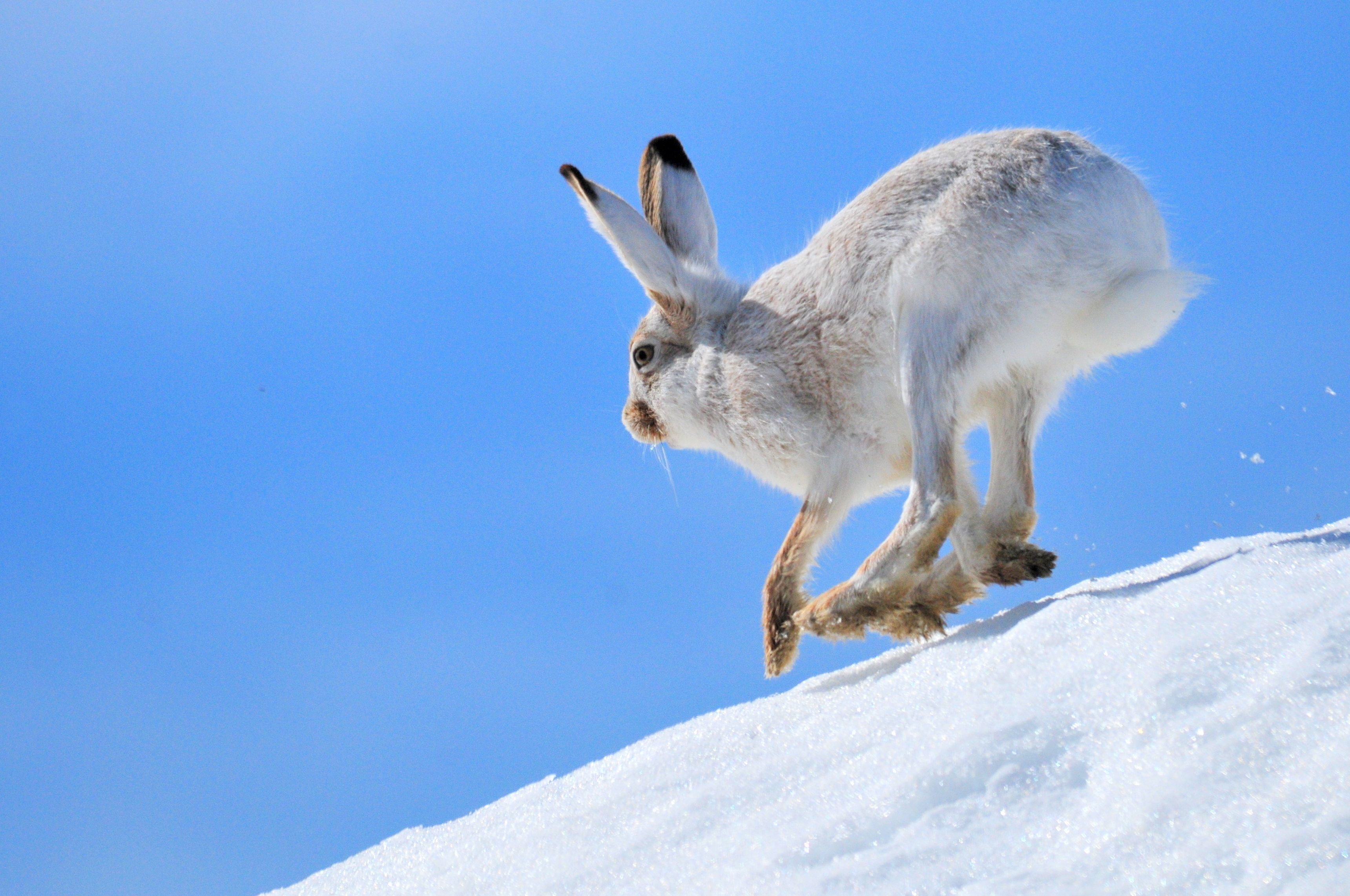 Photo: Tom Koerner/USFWS